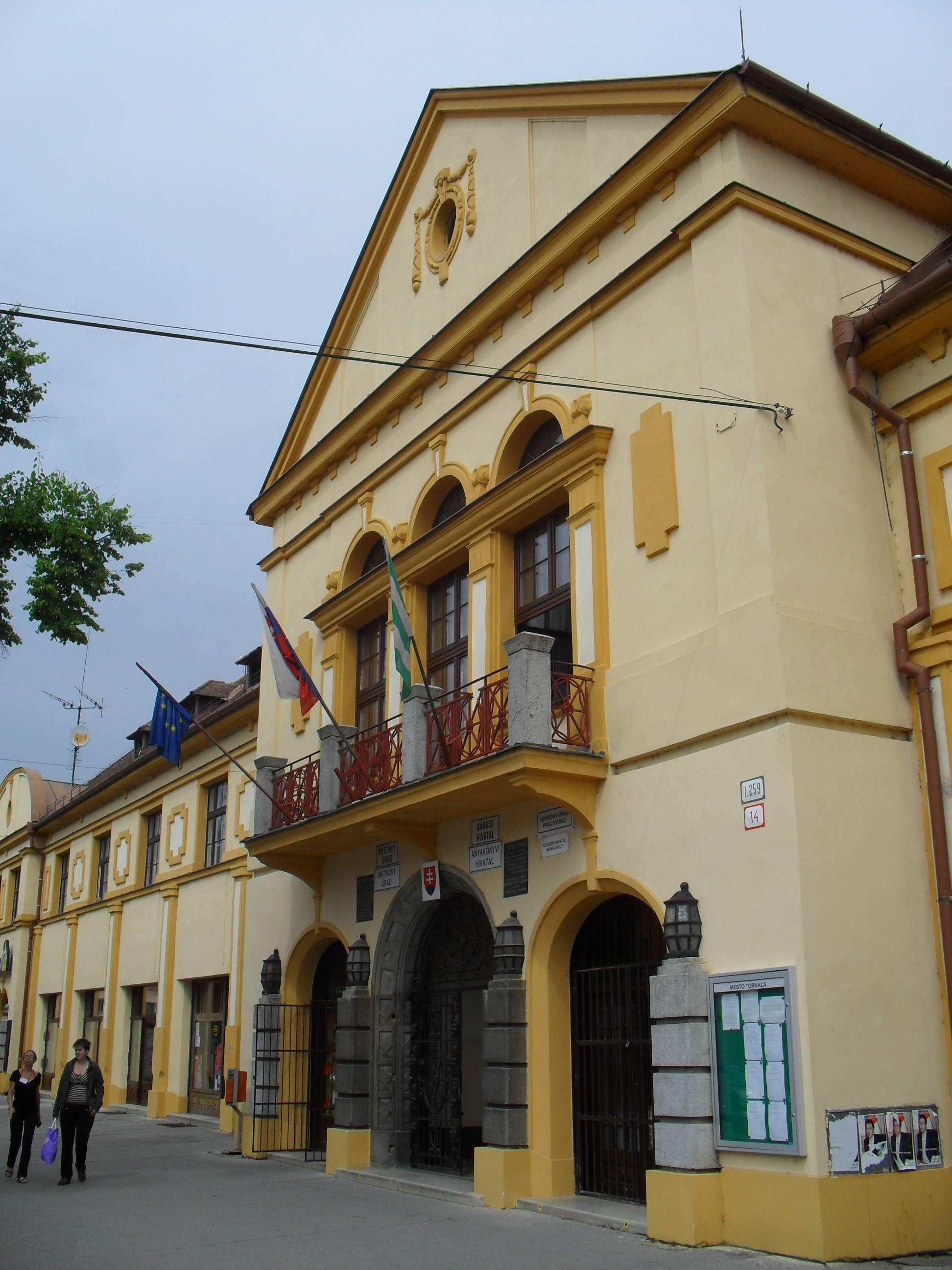 Tornalja - városháza